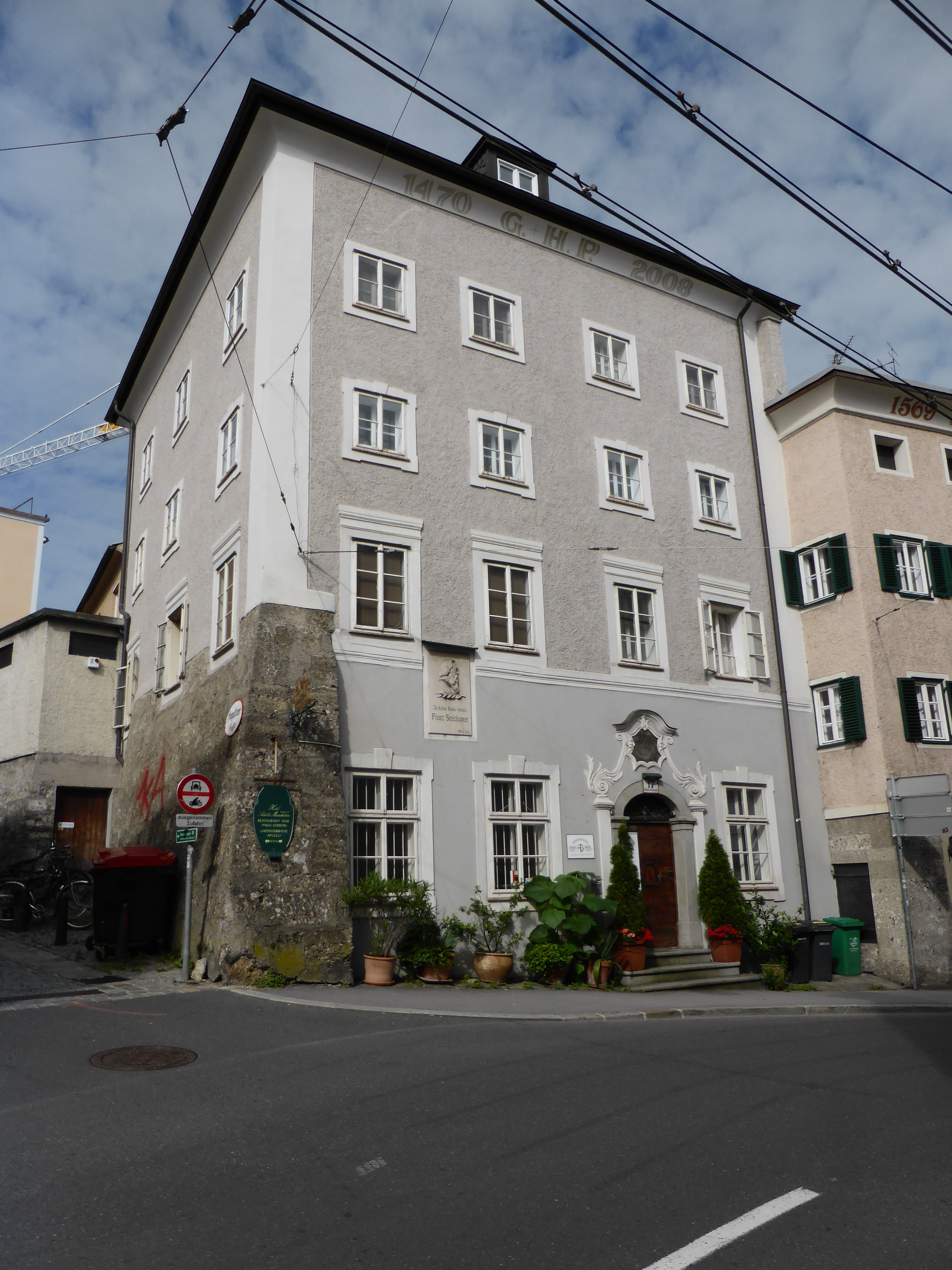 Das 1701 von Christoph Egedacher erworbene Haus in Mülln